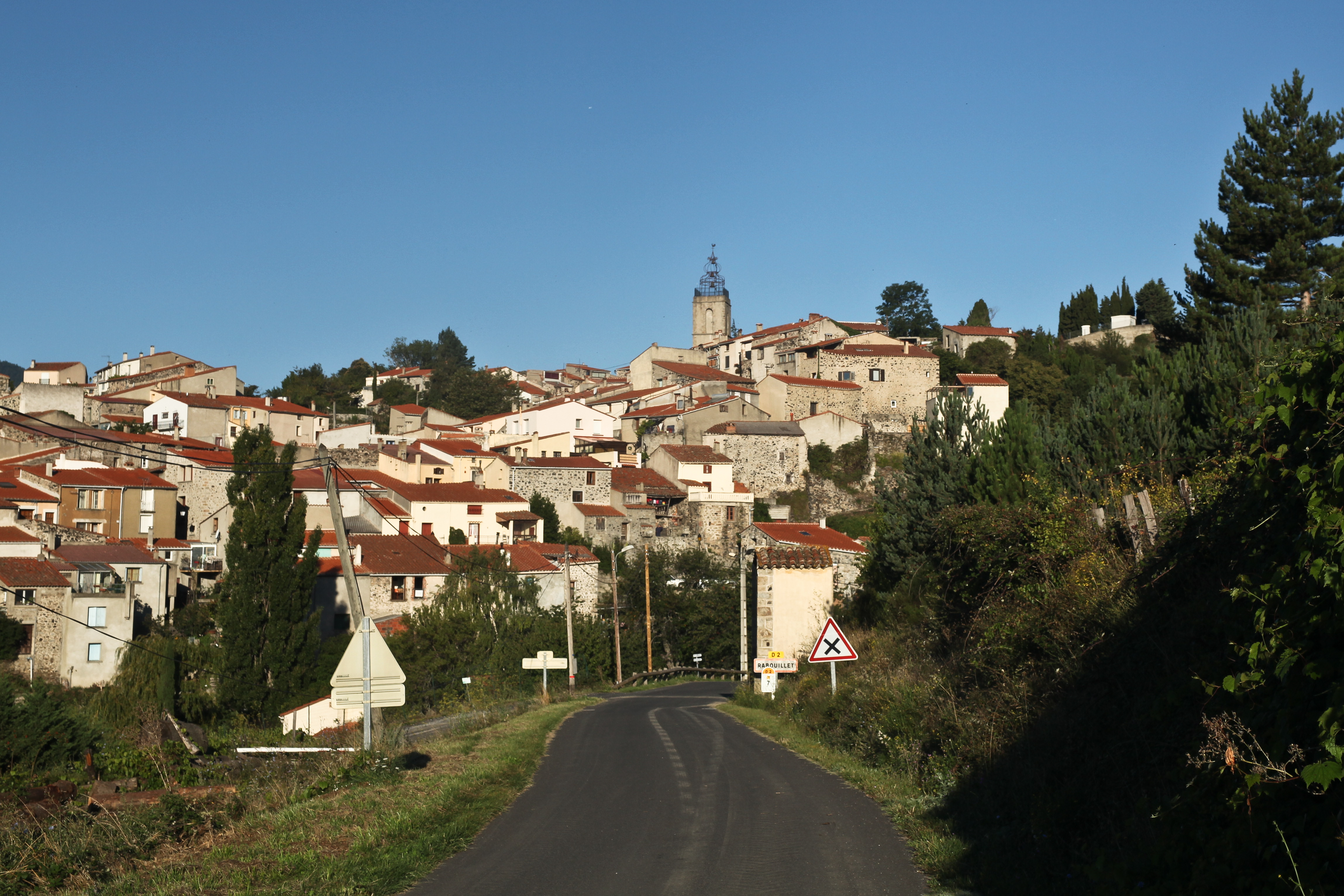 Vue générale du village de Rabouillet